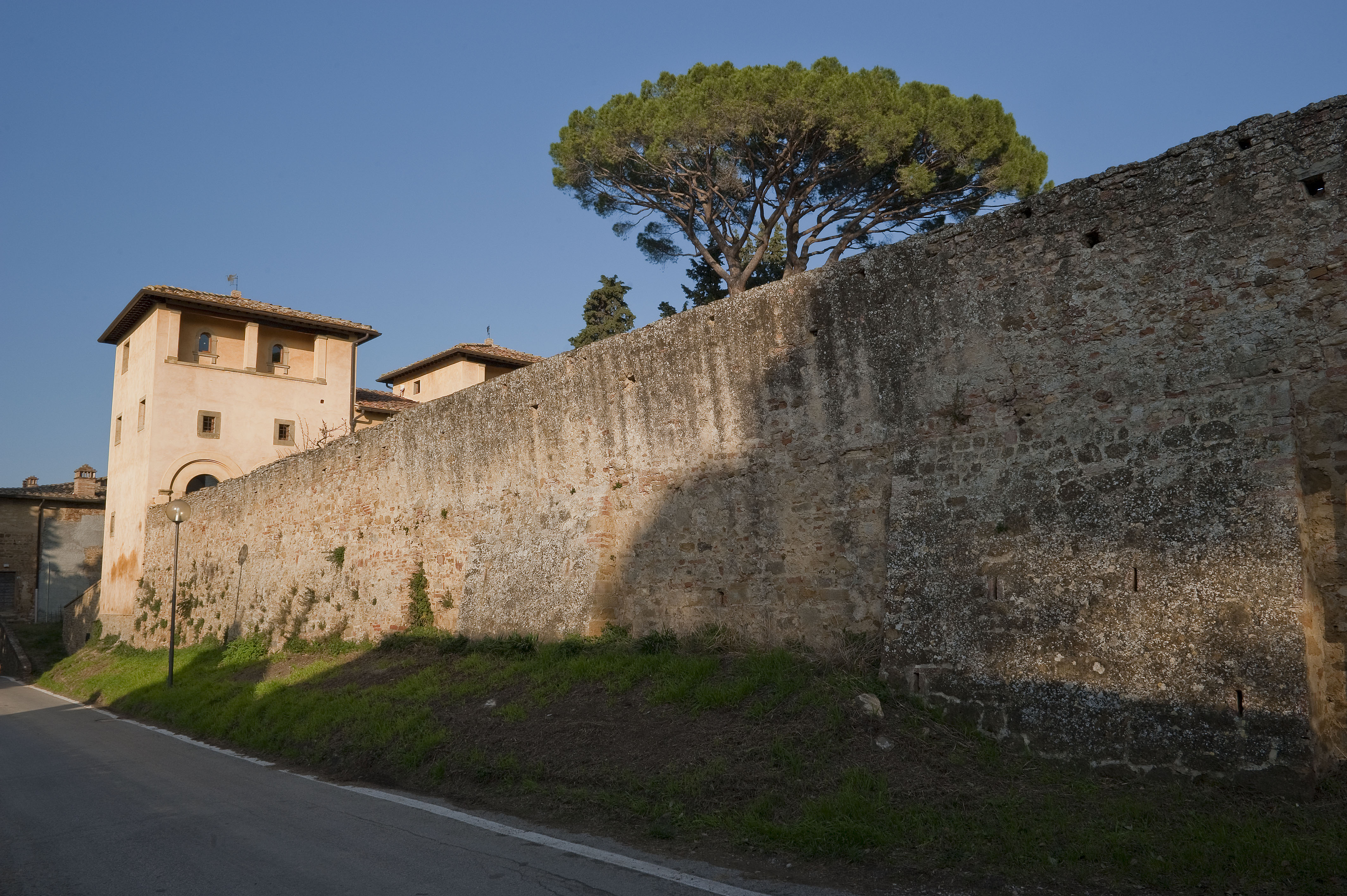 Mura di cinta del Borgo di Petrognano - Semifonte